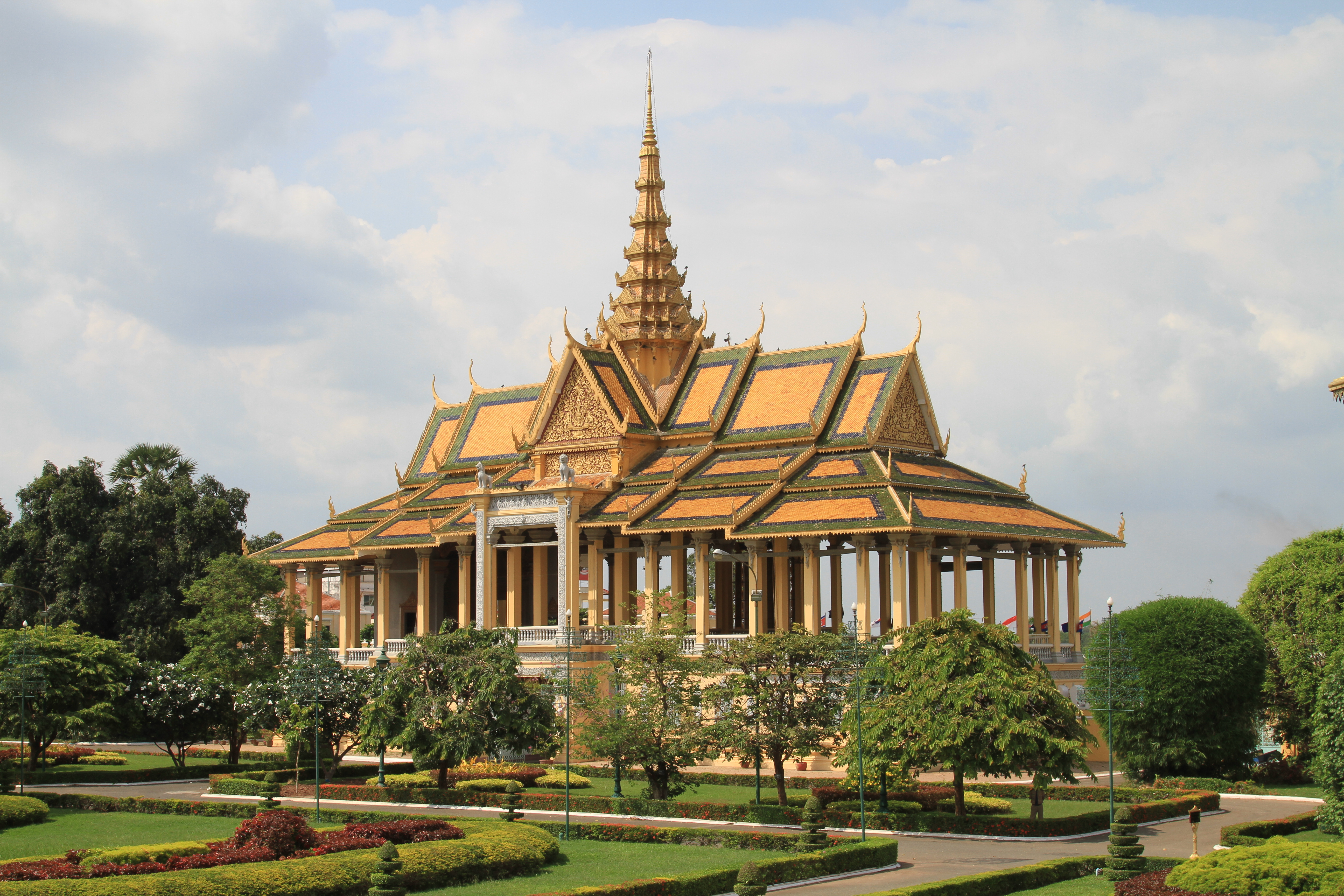 Sangkat Chey Chumneah, Phnom Penh 12206, Cambodia